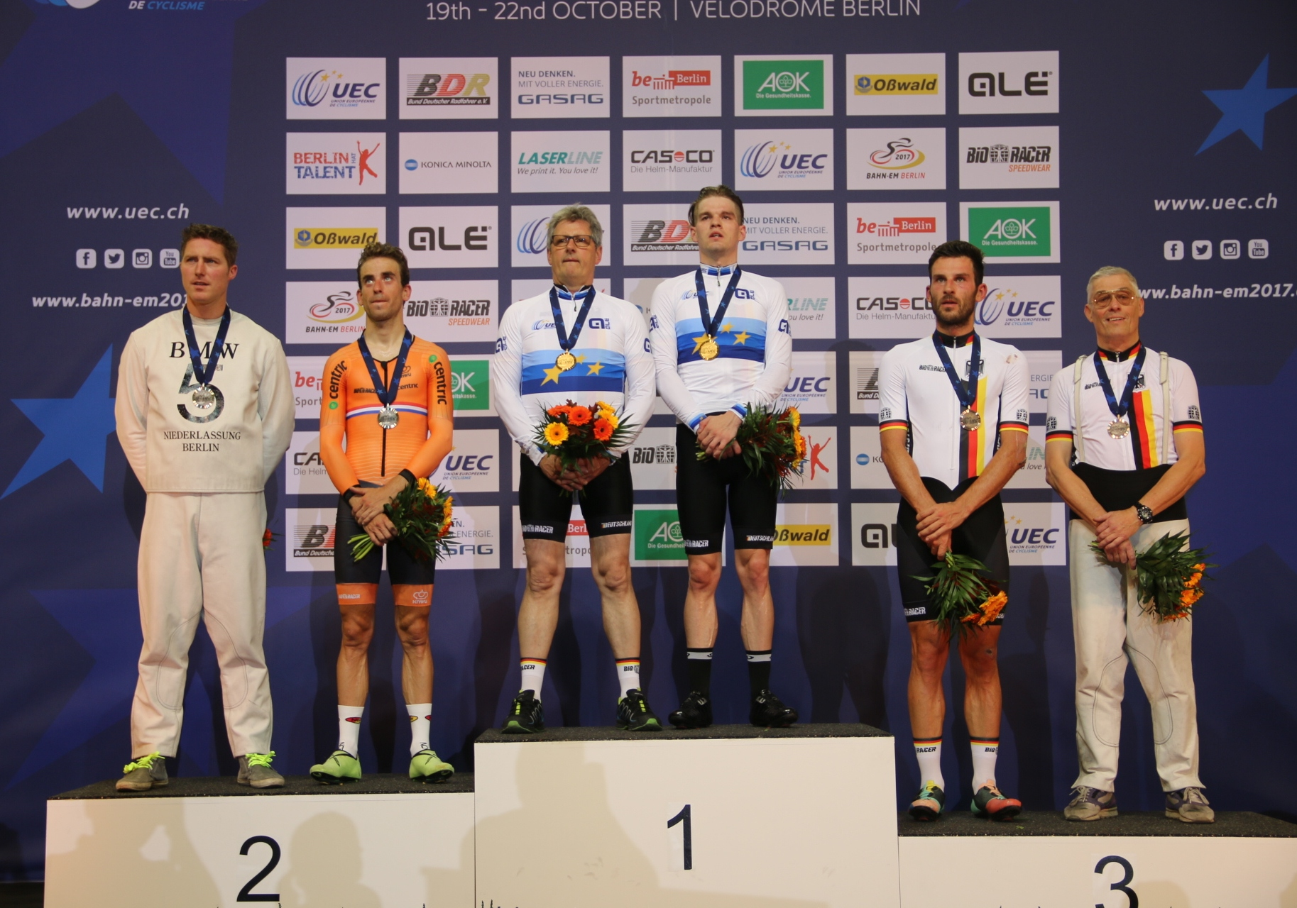 Podium Steherrennen, v.l.n.r.: Jos Pronk, Reinier Honig, Gerd Gessler, Franz Schiewer, Stefan Schäfer, Peter Bäuerlein